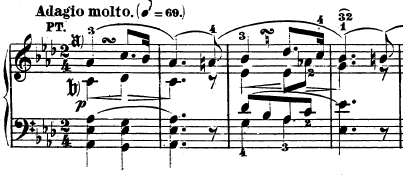 Compassos iniciais do segundo movimento da Sonata Op. 10 nº 1 de Beethoven